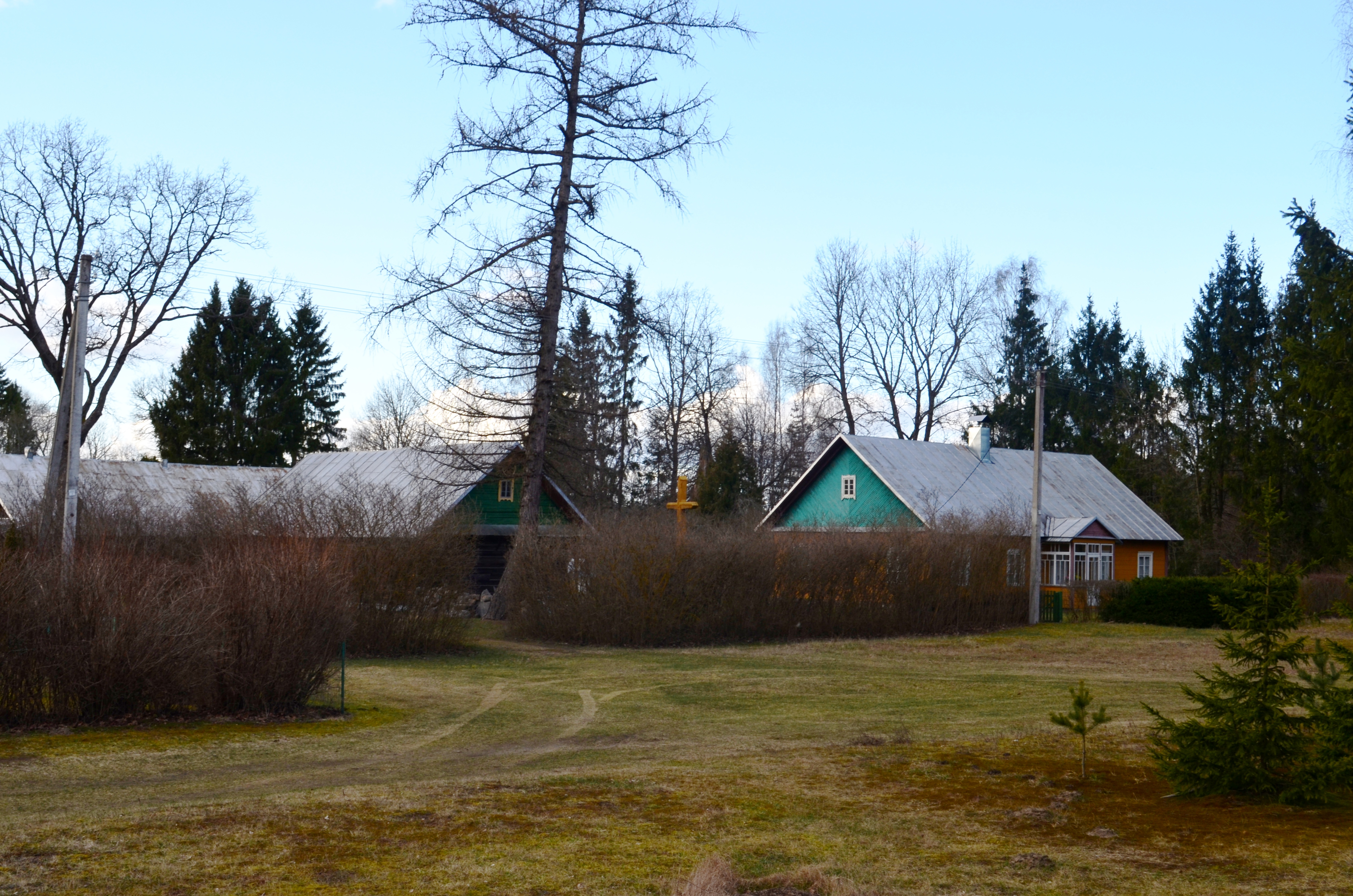 Pauriškiai, Svėdasų sen., Anykščių raj.